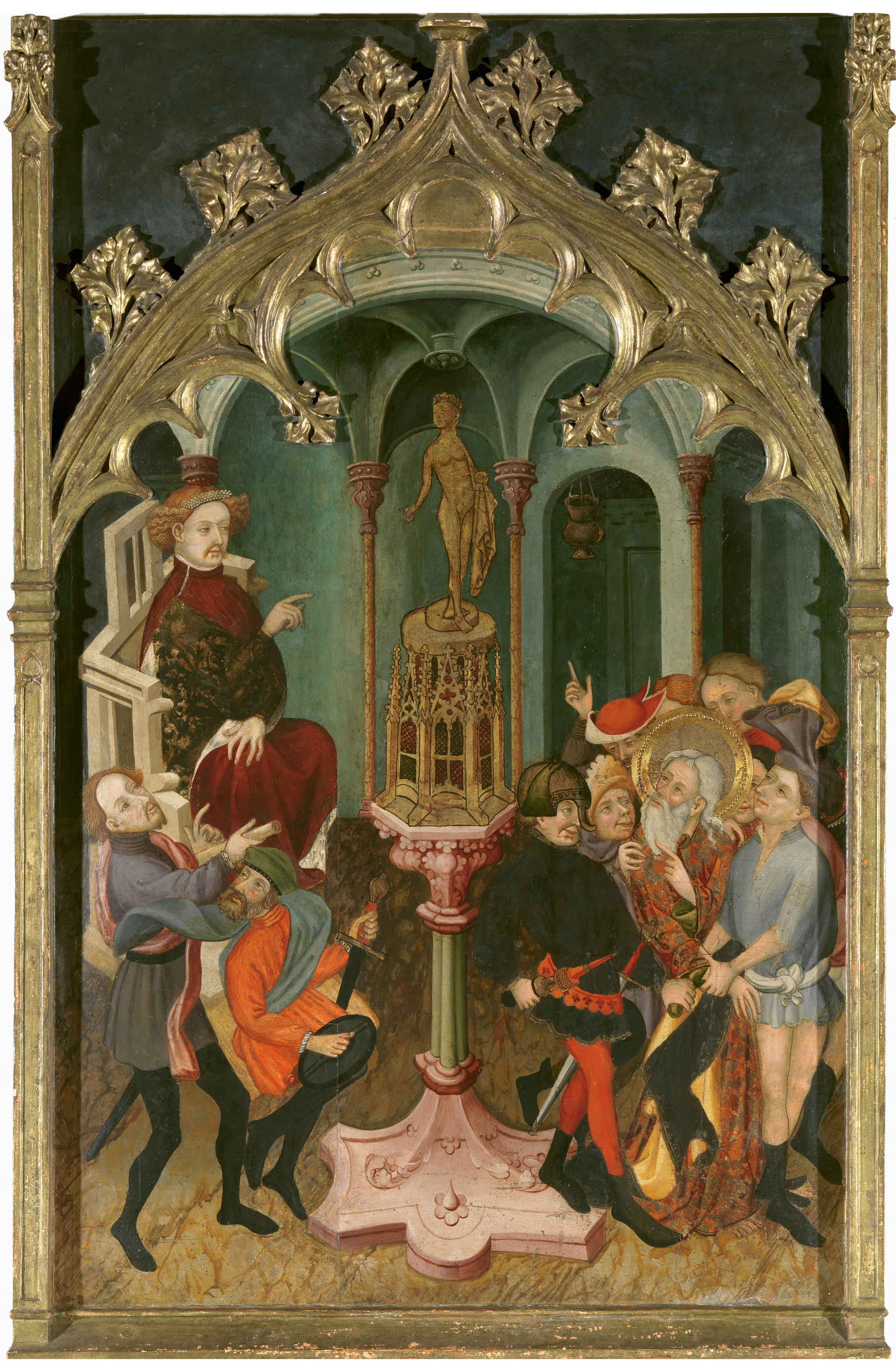 El modo en el que Borrassà realizó la composición, con el ídolo dorado situado en el centro y elevado sobre una compleja estructura, le permitió distribuir a ambos lados a los dos grupos que aparecen en la escena, evitando así la sensación de ahogo espacial. A la izquierda dispuso al procónsul Agen sobre un alto trono y otras dos figuras masculinas representadas a sus pies, mientras que a la derecha situó a San Andrés Apóstol y al grupo de soldados y sayones que le conducen prisionero ante el procónsul. Esta obra, al estar realizada en su totalidad por Luis Borrassà, muestra algunos de los rasgos más característicos del artista: los tipos humanos traducidos con sus gestos y actitudes vivaces, las arquitecturas y pavimentos que se repiten en otras obras de su mano, y el rico colorido presente en sus composiciones, notas todas ellas que ponen de manifiesto que esta obra corresponde a los primeros años del siglo XV, un momento en el que Borrassà mostraba un dominio del lenguaje del Gótico Internacional que le hizo destacar sobre otros pintores coetáneos (Texto extractado de Silva, P.: Donación Várez Fisa, Museo Nacional del Prado, 2013, p. 24).